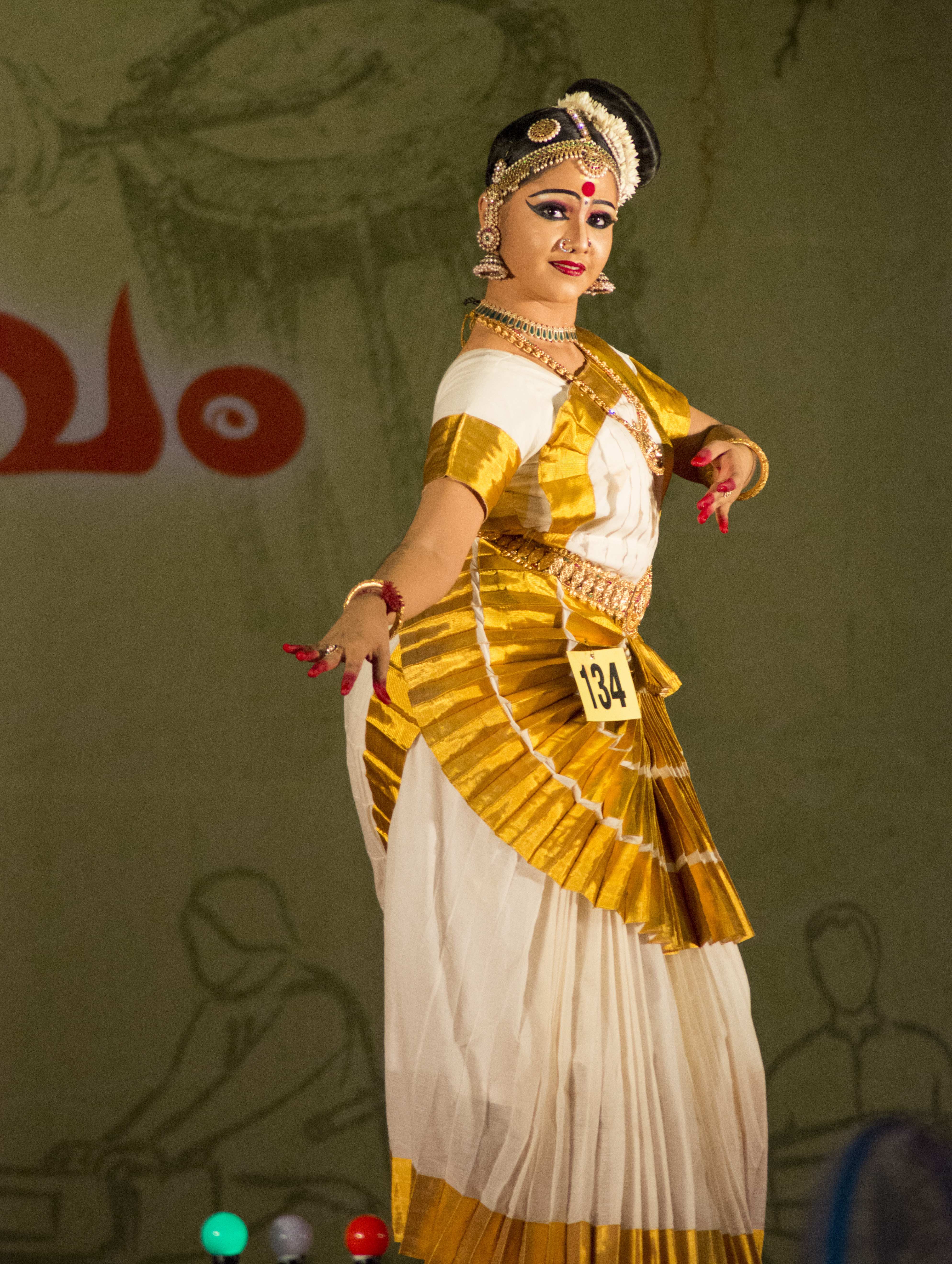 Kerala SchoolKalolsavam 2017